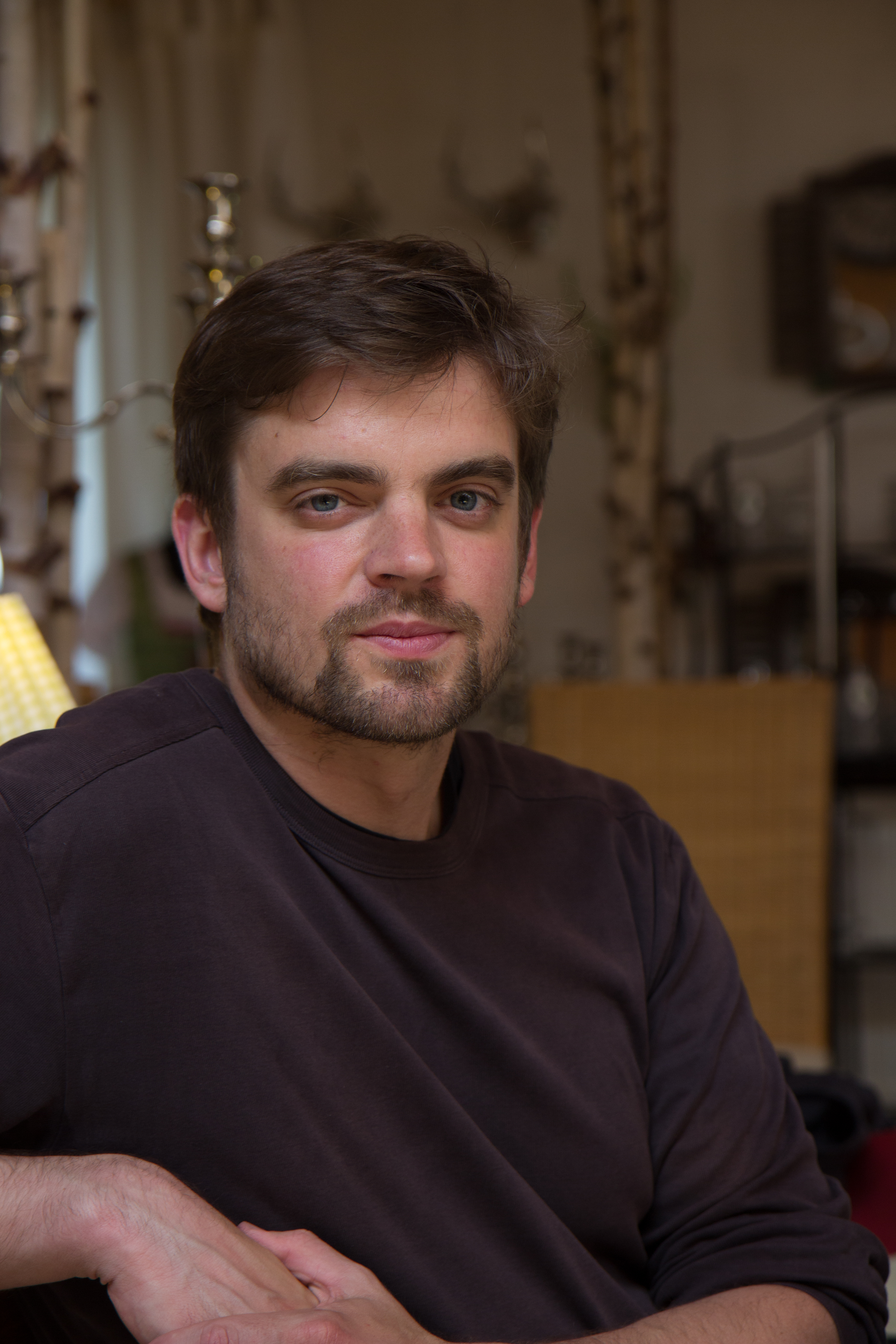 Der Schriftsteller Matthias Nawrat beim Hausacher Leselenz 2013